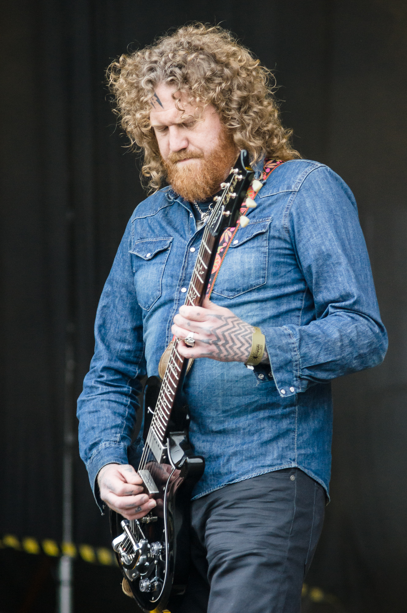 Brent Hinds - gitarzysta zespołu Mastodon podczas koncertu na festiwalu Ursynalia 2012.